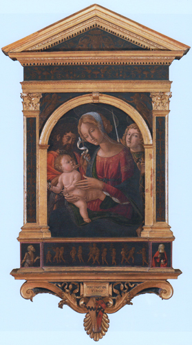 La Madonna col Bambino, san Giovanni Battista e san Michele Arcangelo (Vierge à l'Enfant entre les saints Jean Baptiste et Michel) est une peinture a tempera sur panneau de bois de 75 × 50 cm (panneau peint), qui peut être datée de 1496, réalisée par Neroccio di Bartolomeo de' Landi, et conservée dans la sacristie de l'Oratorio della Compagnia della Santissima Trinità à Sienne.